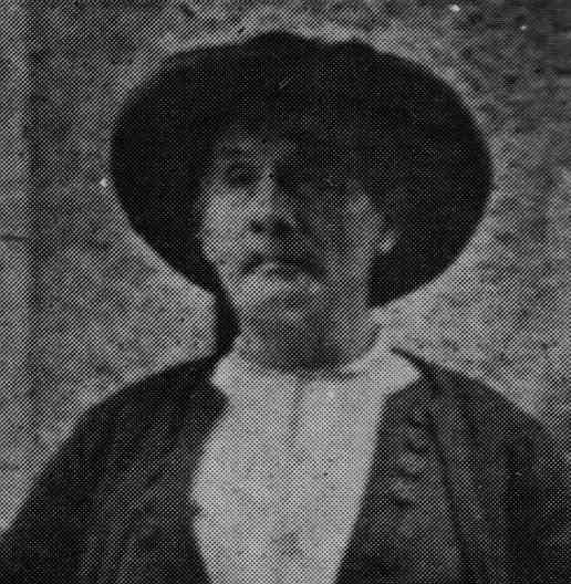 Portrait de Louis Le Floc'h (1868 - 1937) dans An Oaled